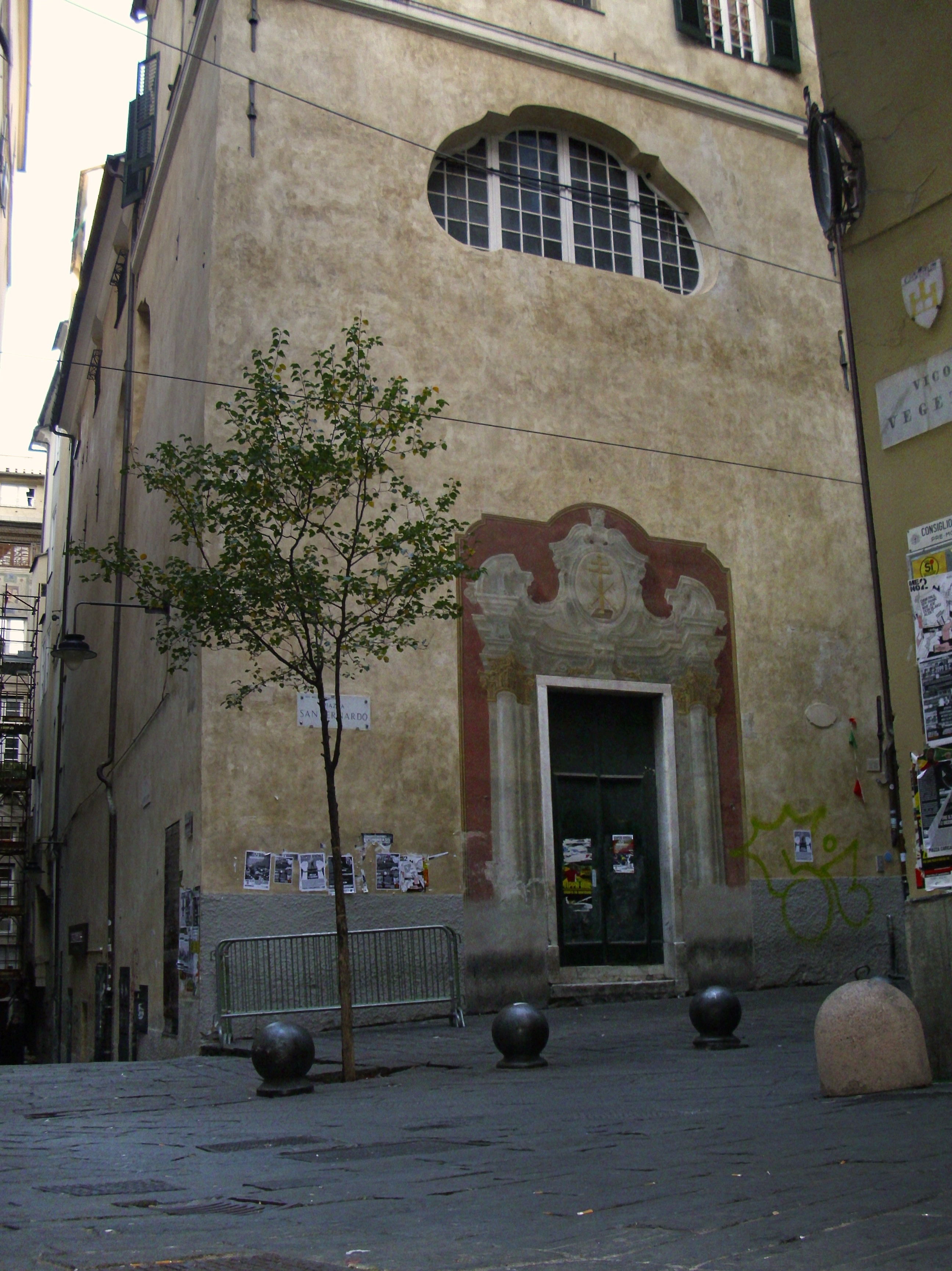 L'ex Oratorio dei Santissimi Pietro e Paolo a Genova, in piazza San Bernardo. Edificato nel 1722, agli inizi del XX secolo venne requisito ed usato a partire dal 1918 come deposito di carta dal quotidiano il Secolo XIX. Oggi è sede di alcune associazioni